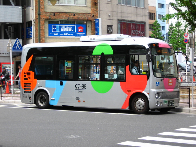 武蔵野市のコミュニティバス「ムーバス」。この車種は三鷹・吉祥寺循環のもの（日野・ポンチョ）